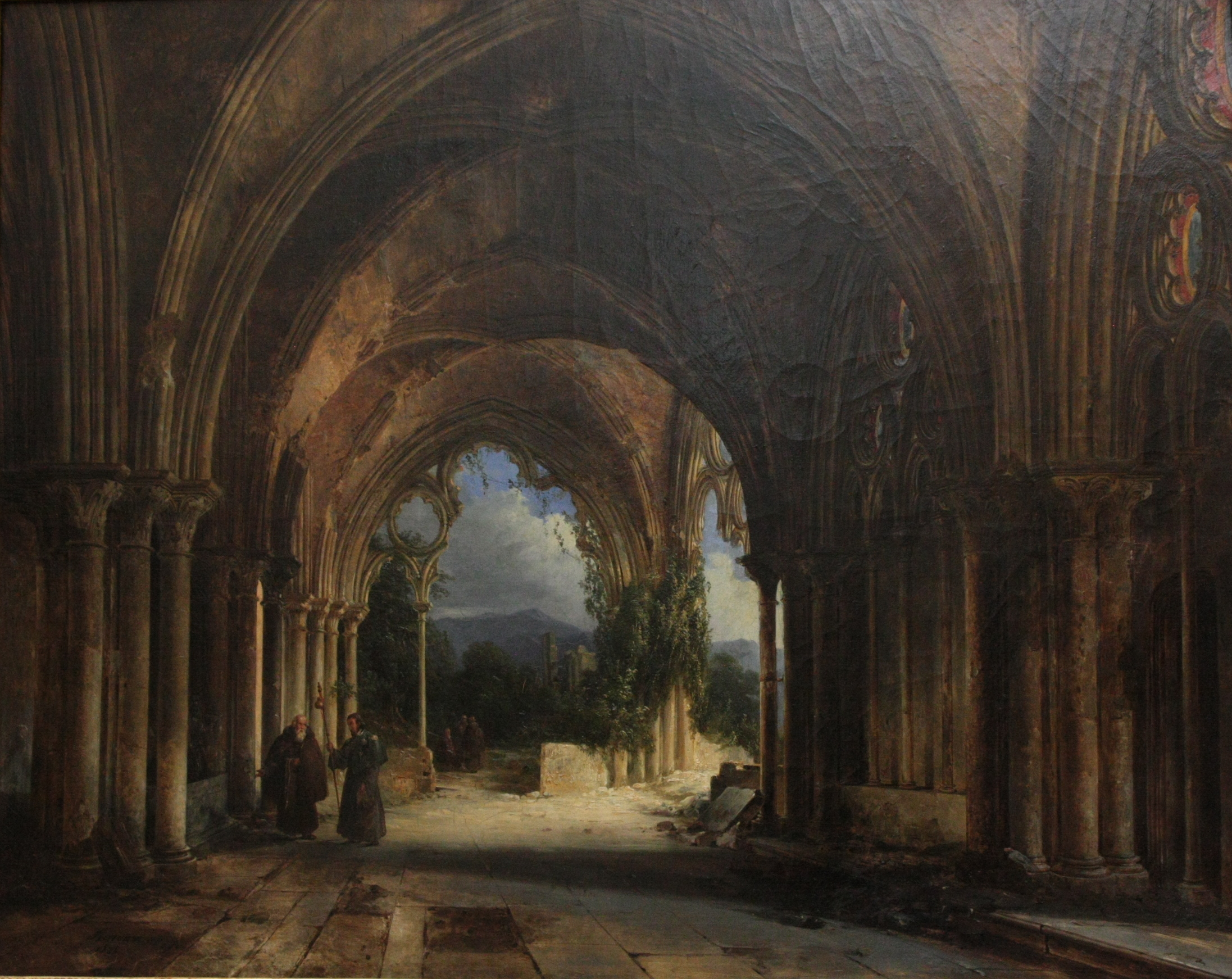 Moines dans une église gothique en ruines de Charles-Caïus Renoux, 1828